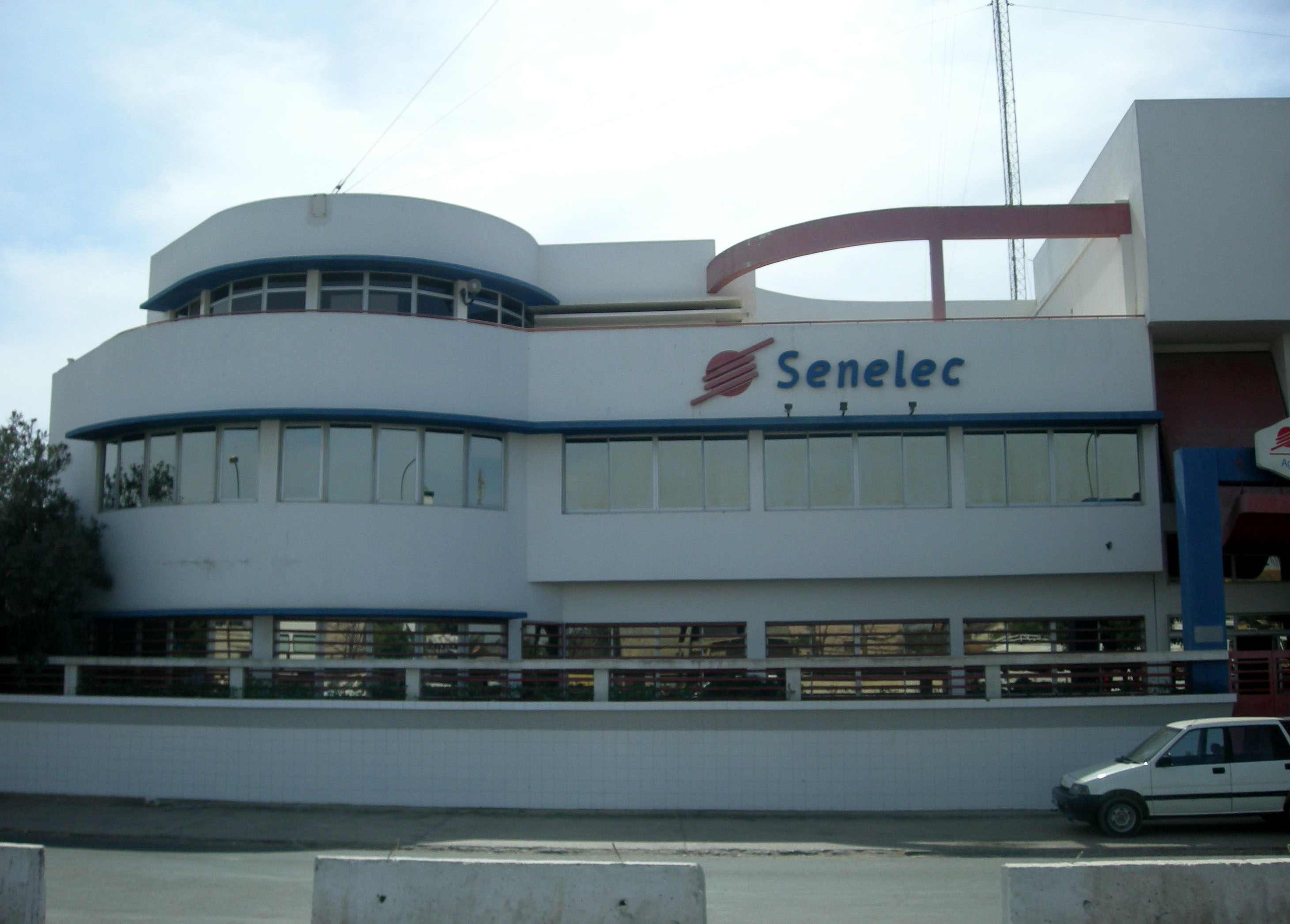 Seenelec à Rufisque (Sénégal)